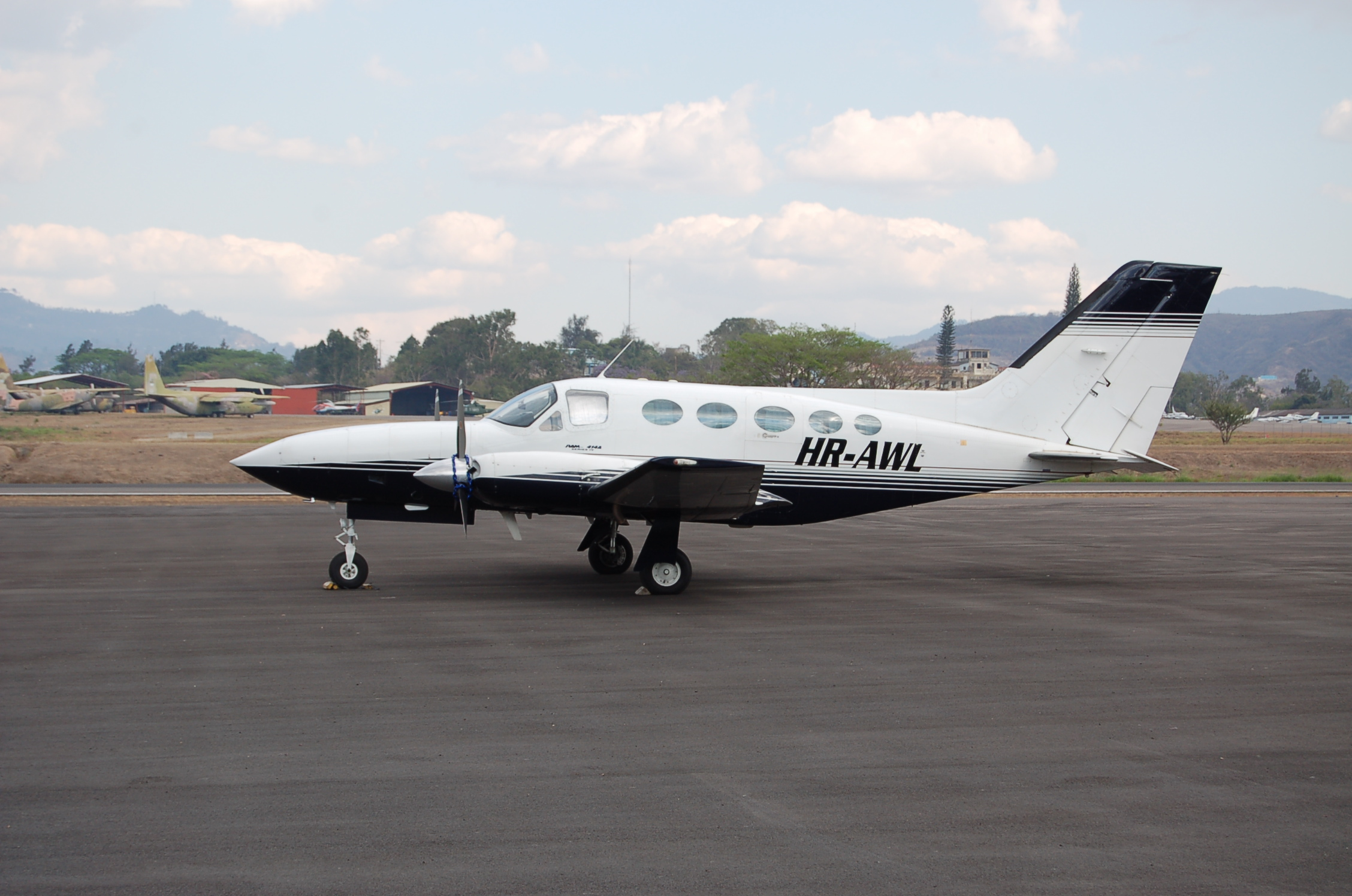 Cessna 414 at Tegucigalpa,Honduras 02/03/11.